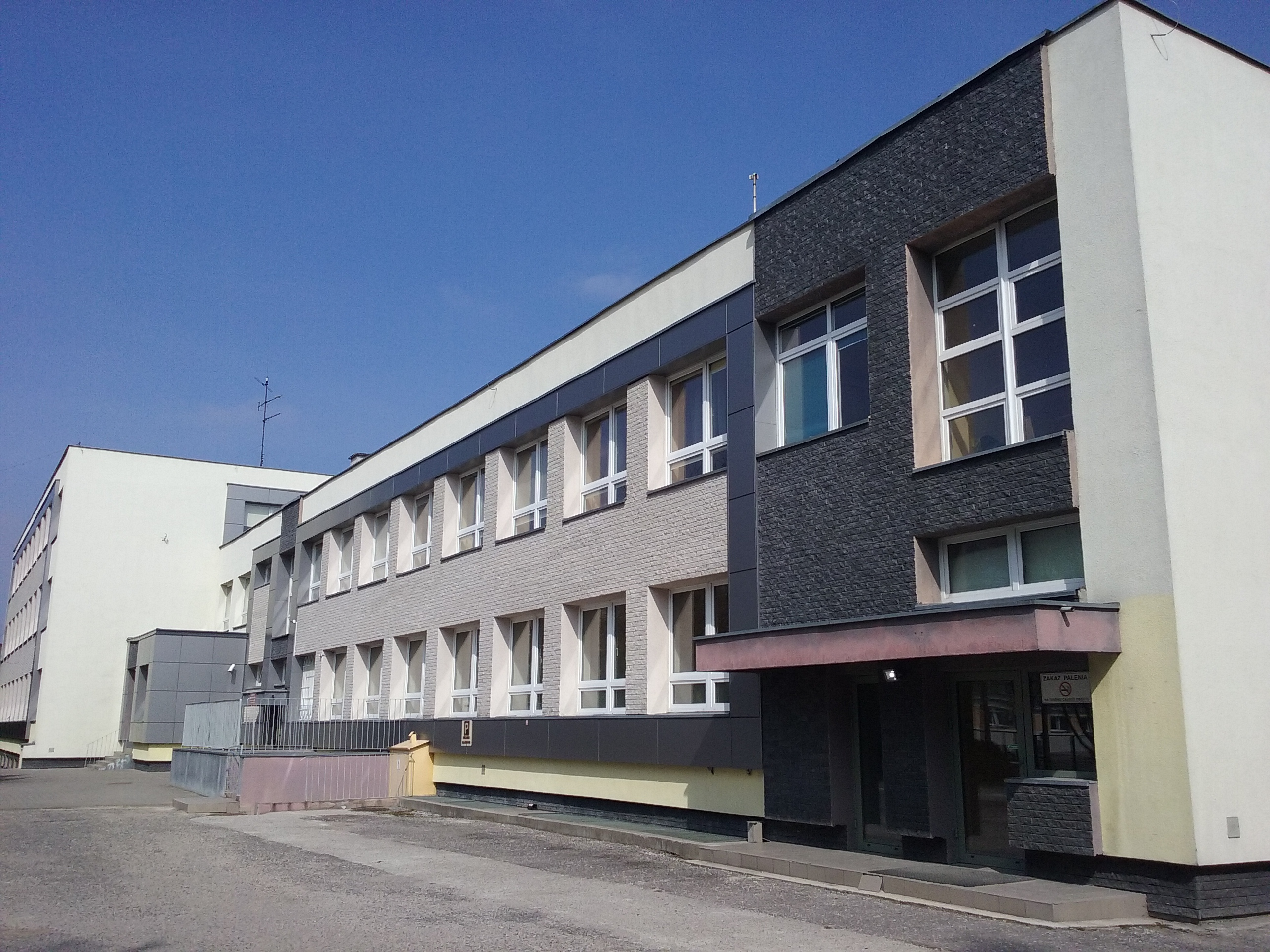 Tomaszów Mazowiecki w województwie łódzkim PL, EU. Szkoła Podstawowa nr 10 na największym tomaszowskim osiedlu Niebrów. Jedna z dwóch w mieście z krytym, całorocznym basenem pływackim. CC0